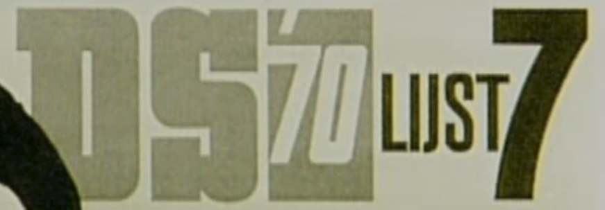 Officiële logo van de Democratisch Socialisten '70